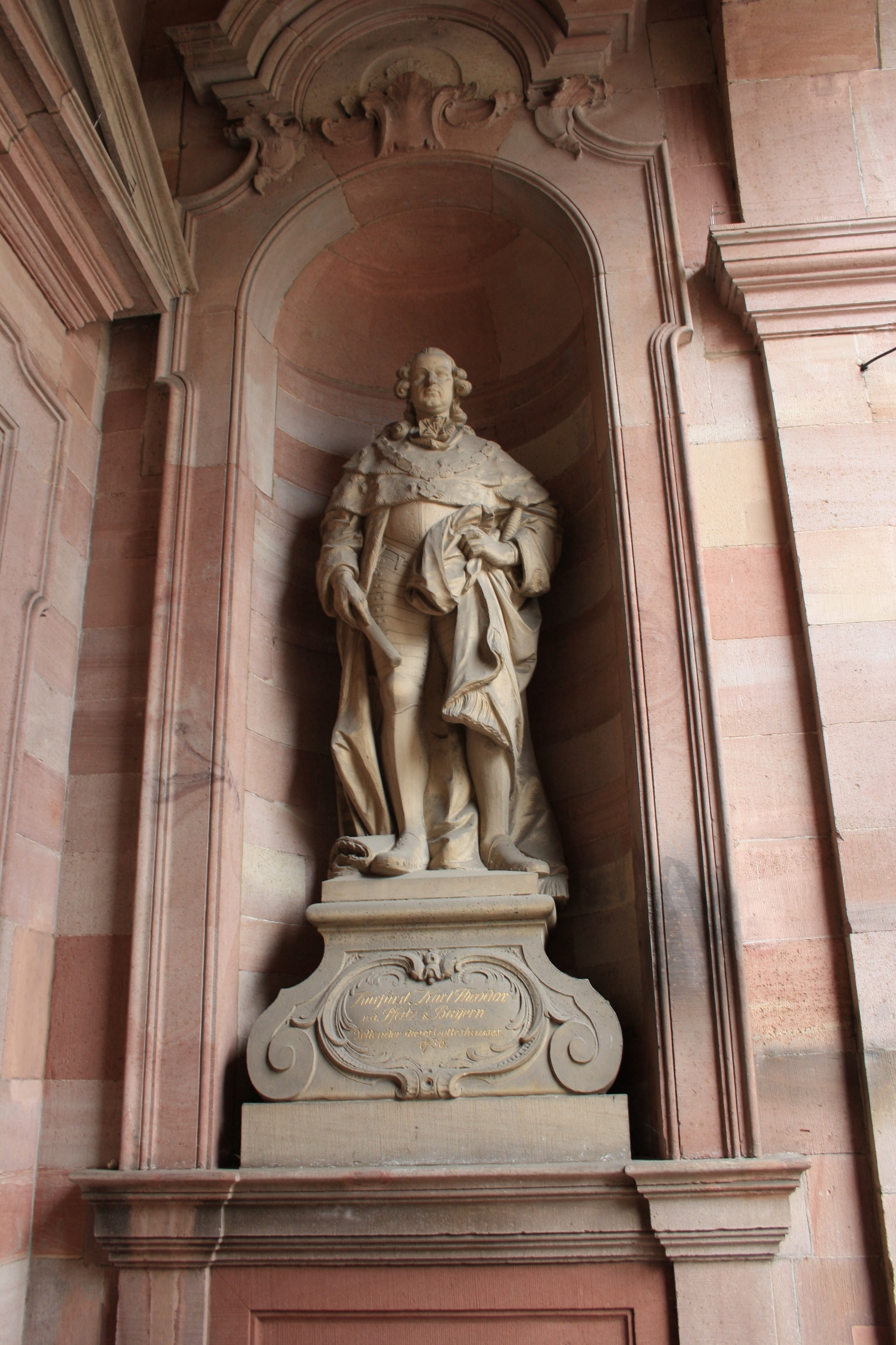 Skulpturen Front